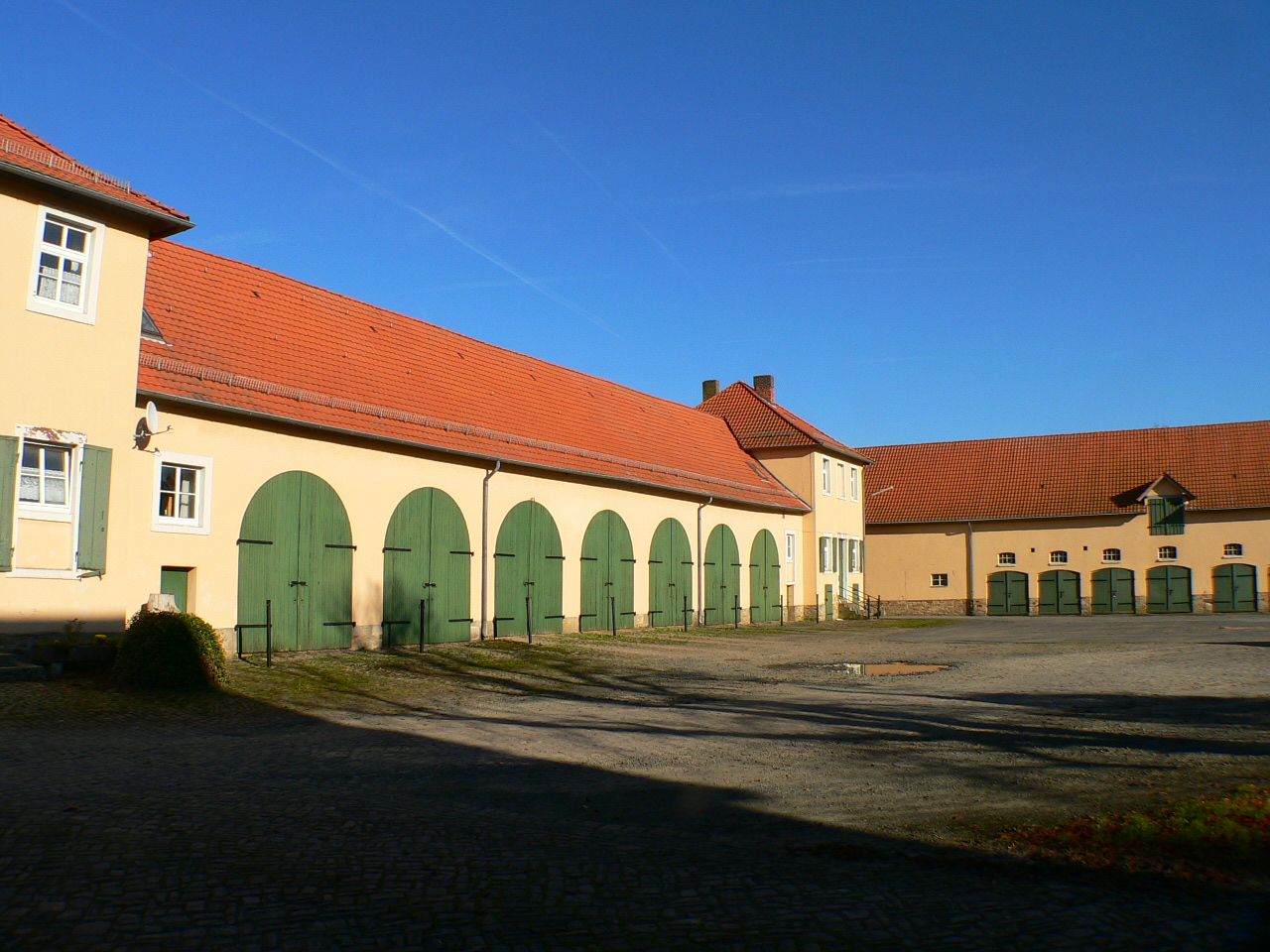 Domäne Beberbeck, Mittelhof